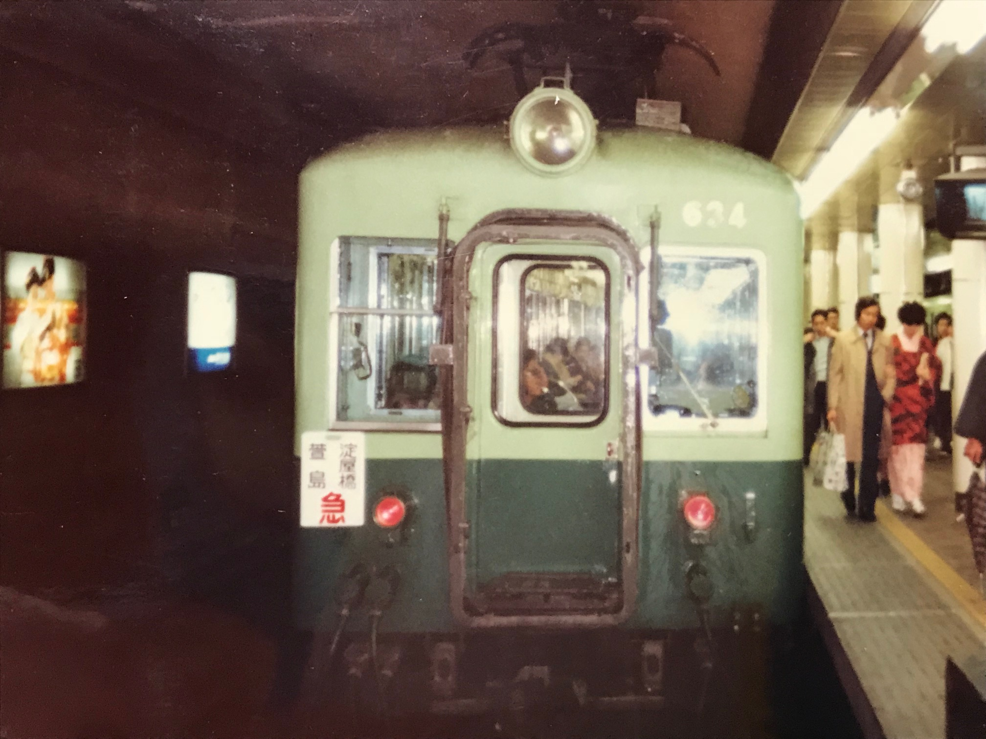 京阪630系区急